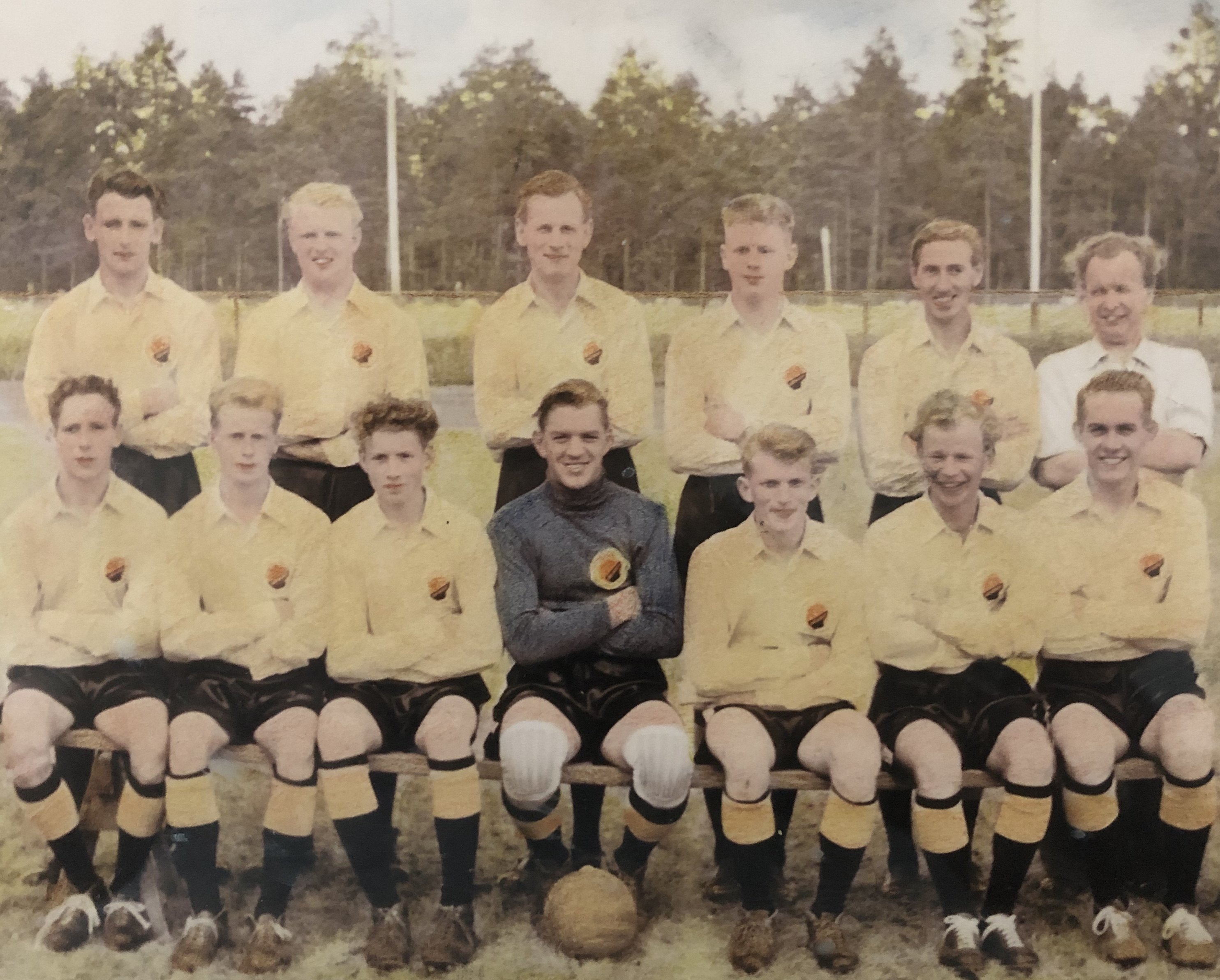 Jenny BKs spelartrupp Stående: Sven-Åke Ström, Lars Johansson, Kurt Andersson, Göran Carlsson, Erik Carlsson, Gunnar Lundgren Sittande: Harry Knutsson, Ingvar Vigren, Per-Inge Karlsson, Stig Svensson, Lars Israelsson, Folke Edmank, Putte Persson